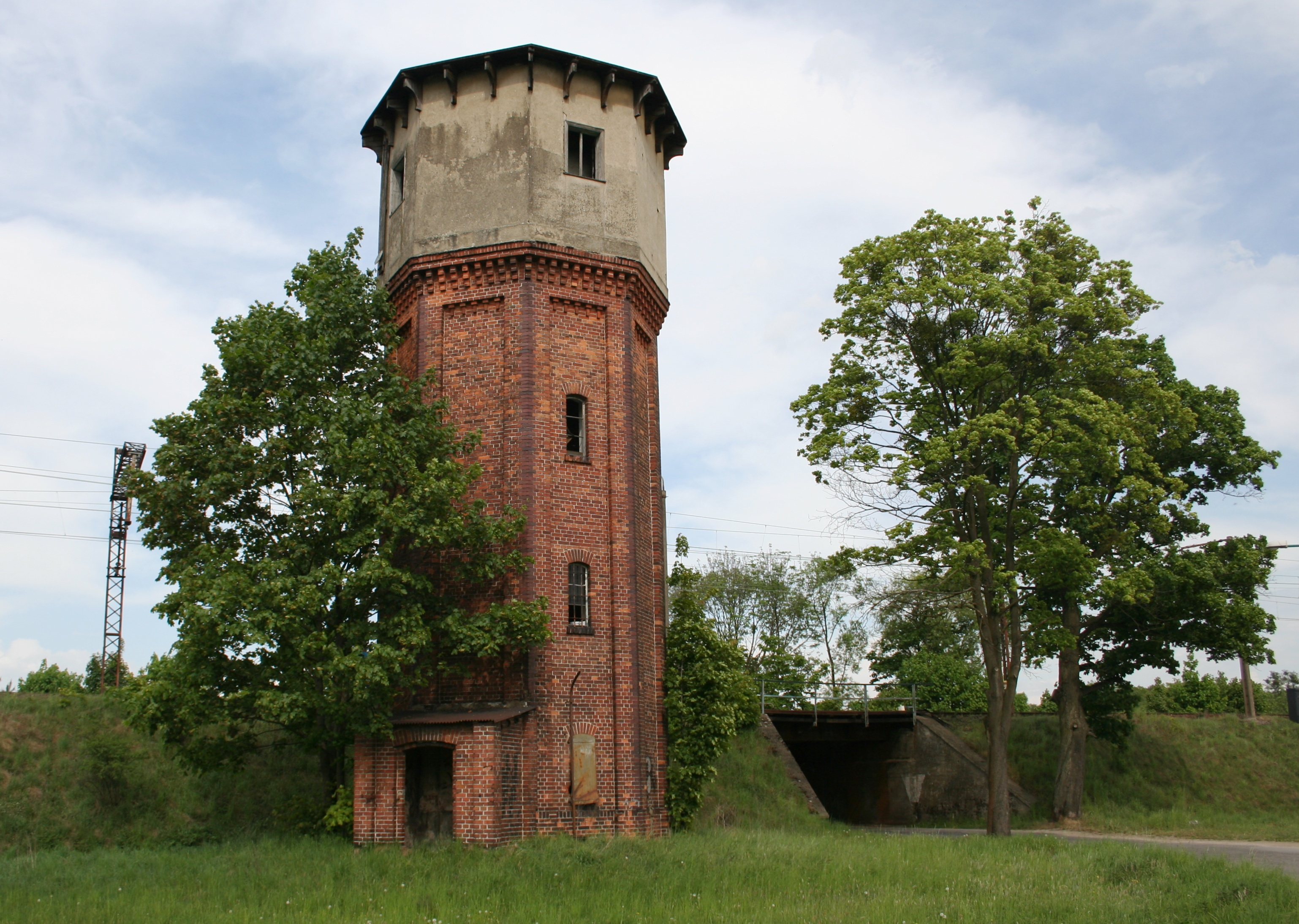 Wieża ciśnień przy stacji kolejowa w Koszęcinie